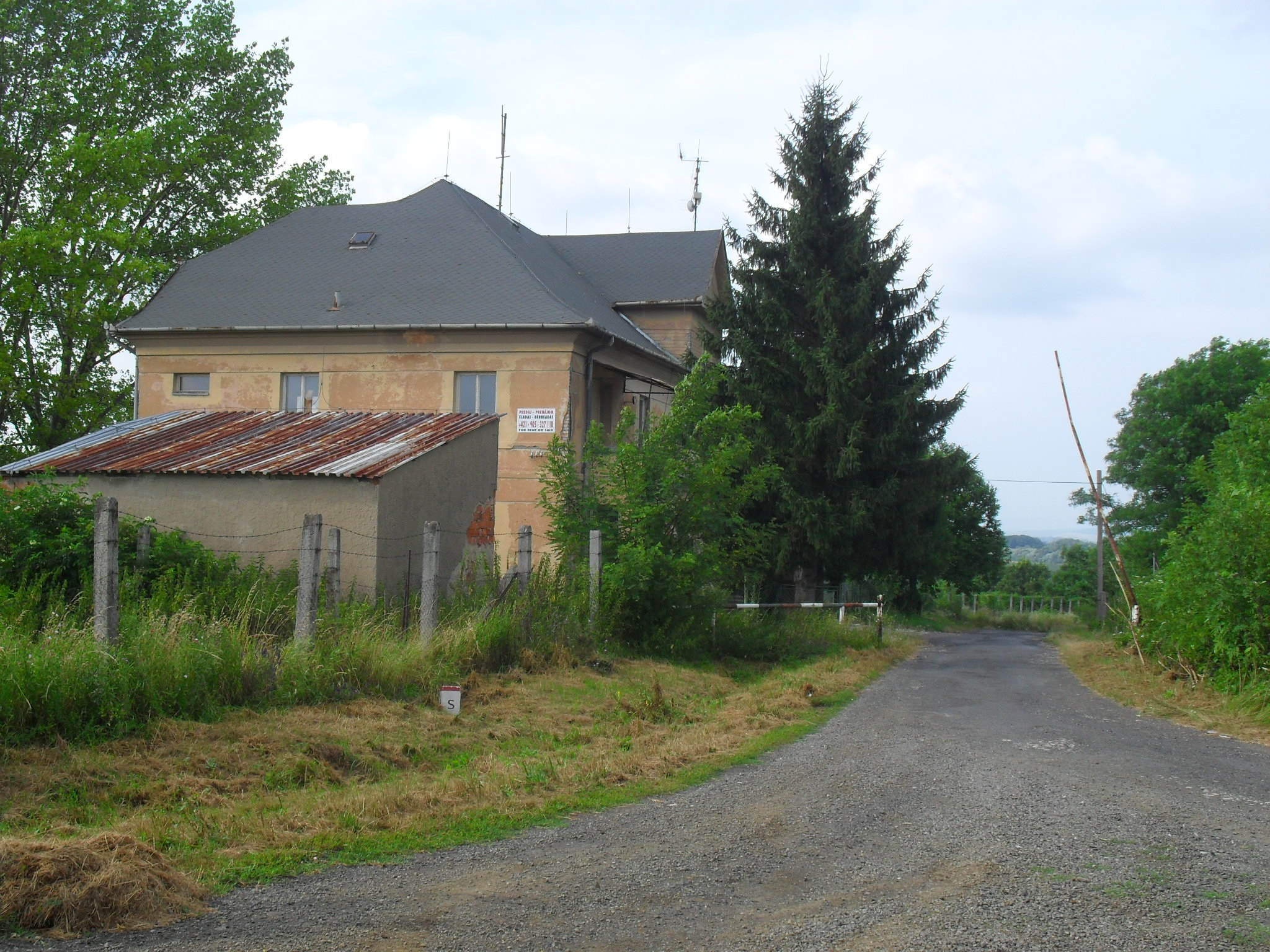 Ipolyvisk - volt határőrlaktanya